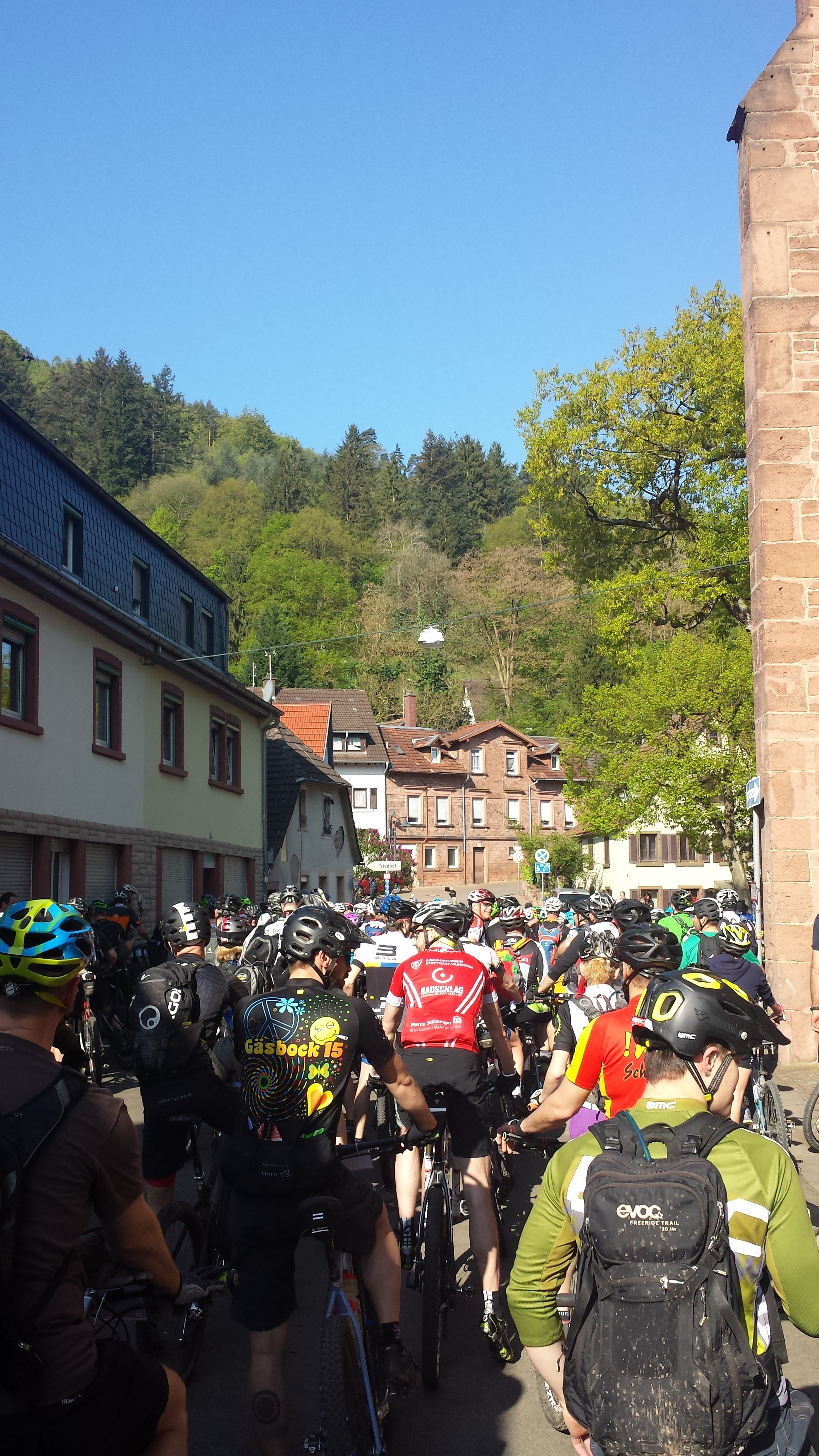 Gäsbock Mountainbike-Marathon 2016. Gäsbockbiker. Eine Startgruppe an der Klosterkirche in Lambrecht.